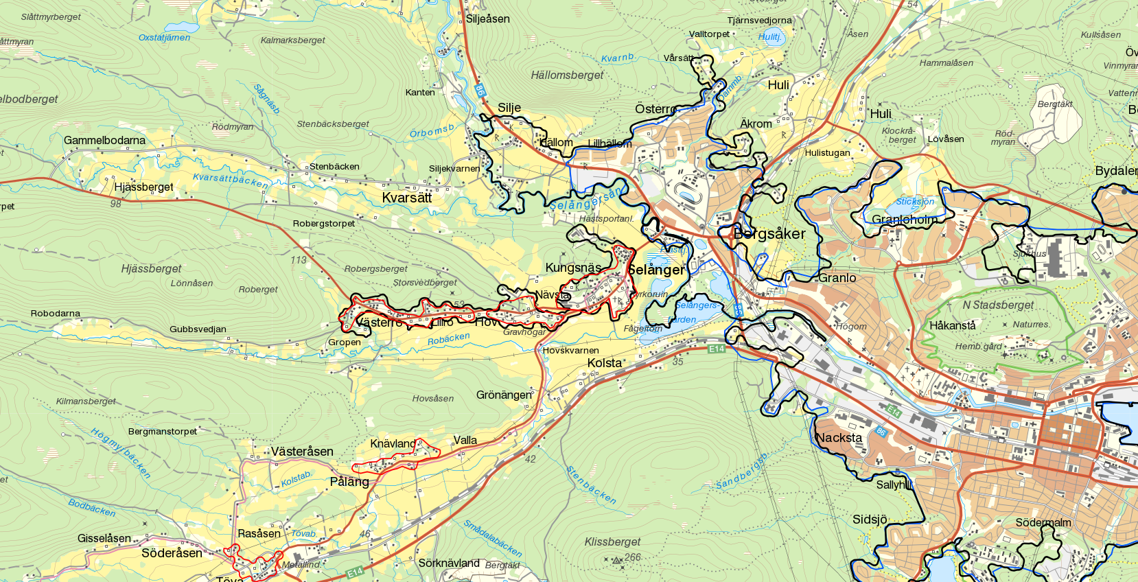 Tätorterna Selånger och Sundsvall med gränserna från Statistiska centralbyråns tätortsavgränsning 2010 i blått och 2015 i svart. Småortsgränser från 2010 i rött. Bakgrundskarta från Lantmäteriet, skala 1:30 236.